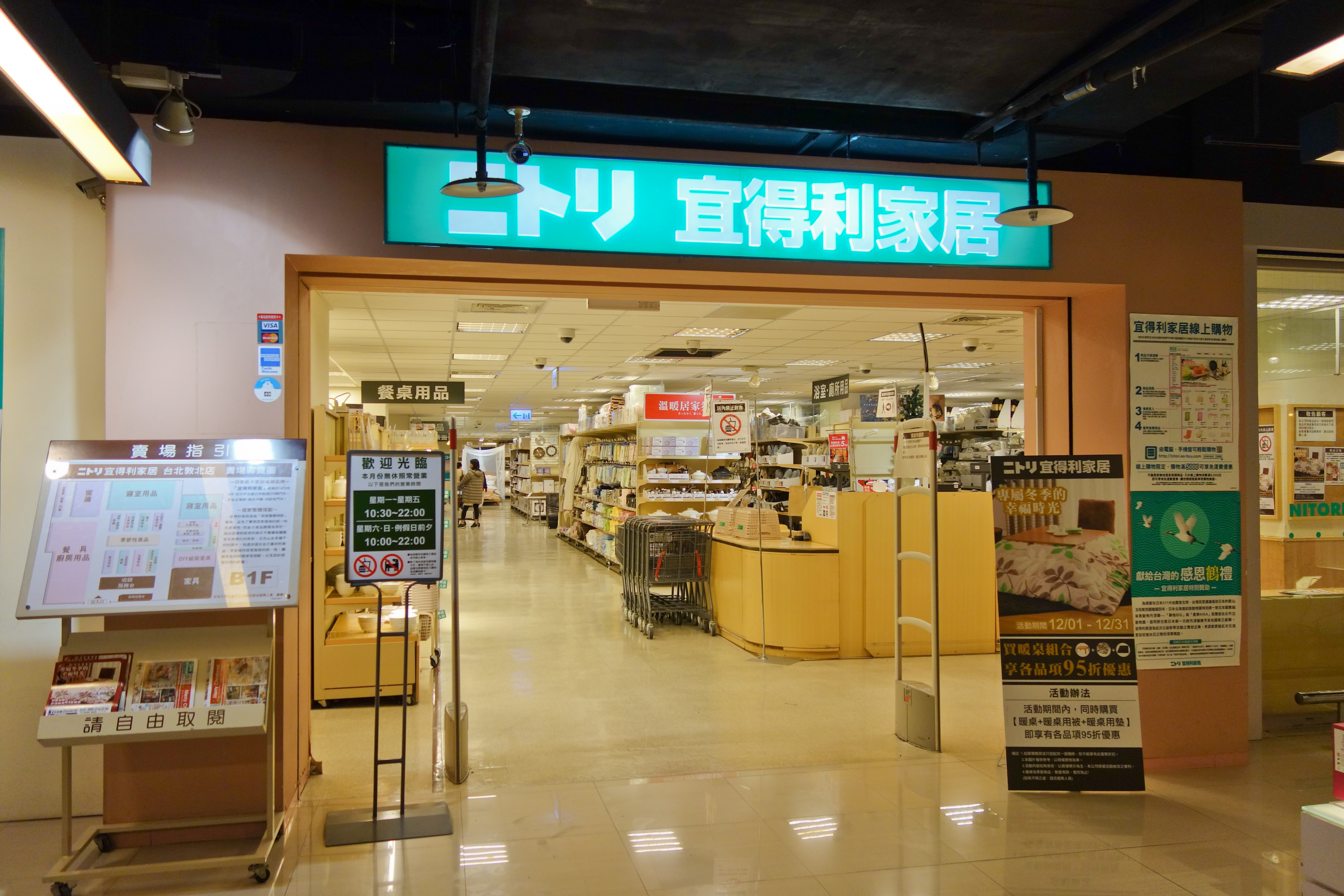 ニトリ台湾（台北敦北店）台北市松山区敦化北路100号地下1階（台北王朝大酒店地下）※同フロアにIKEAと共に入居 敦北店はIKEAと共に入居